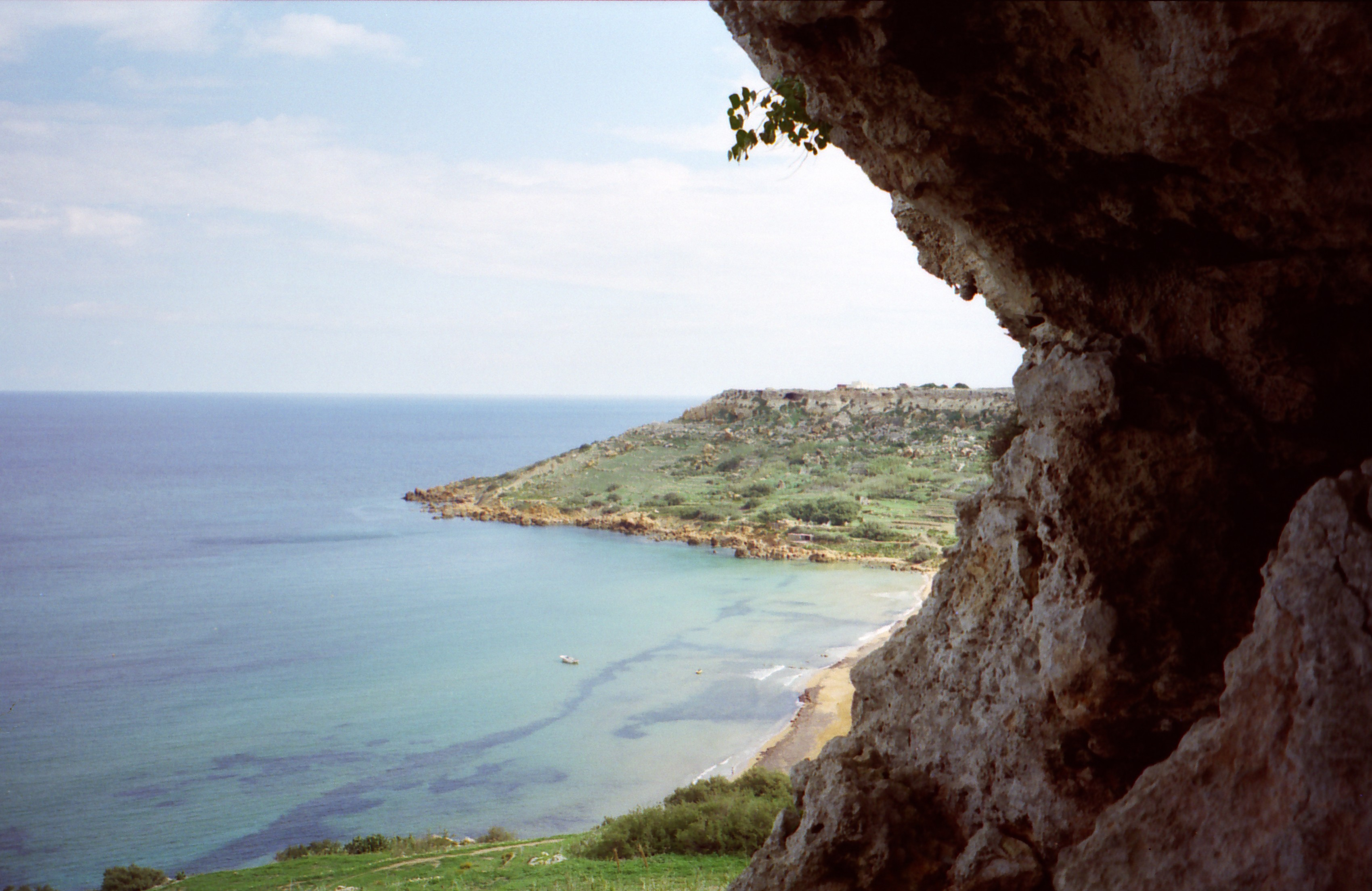 Ramla Bay, Gozo, Malta.